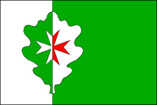 Vlajka obce Doubravice (okres Strakonice)